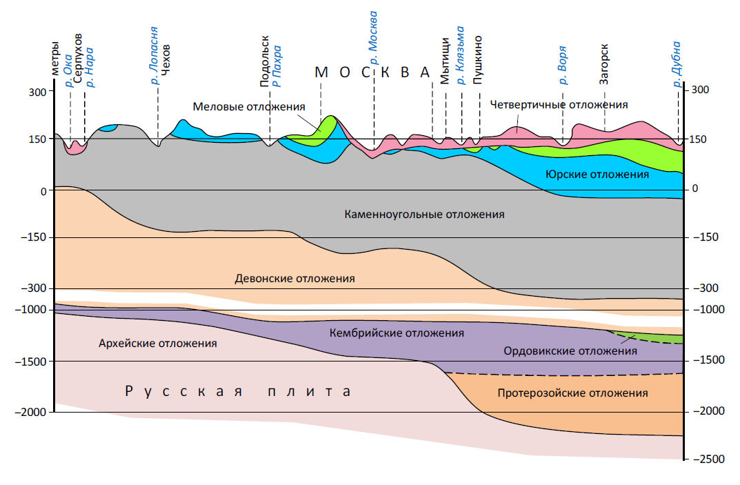 Геологический разрез по линии р. Ока - Москва - р. Дубна. Из атласа Московской области 1964 года.